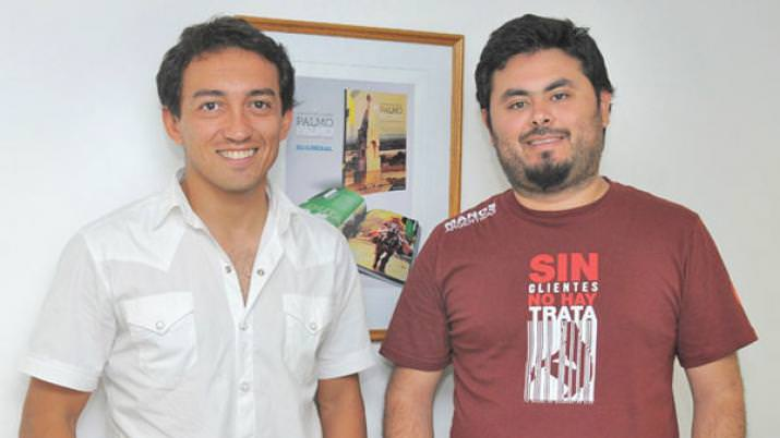 Orellana Lucca